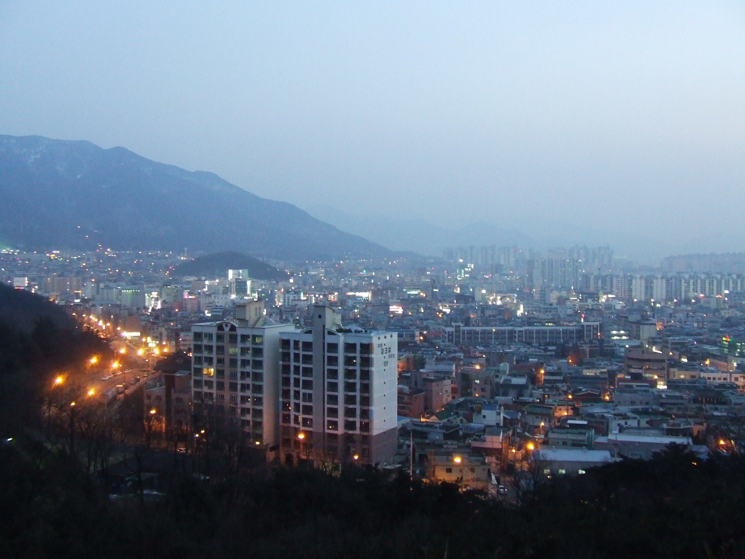 대한민국 대구광역시에 위치한 두류공원에서 본 달서구 일부의 야경(성당동 일대의 주택가와 장기로10길, 미래 파크뷰 아파트)